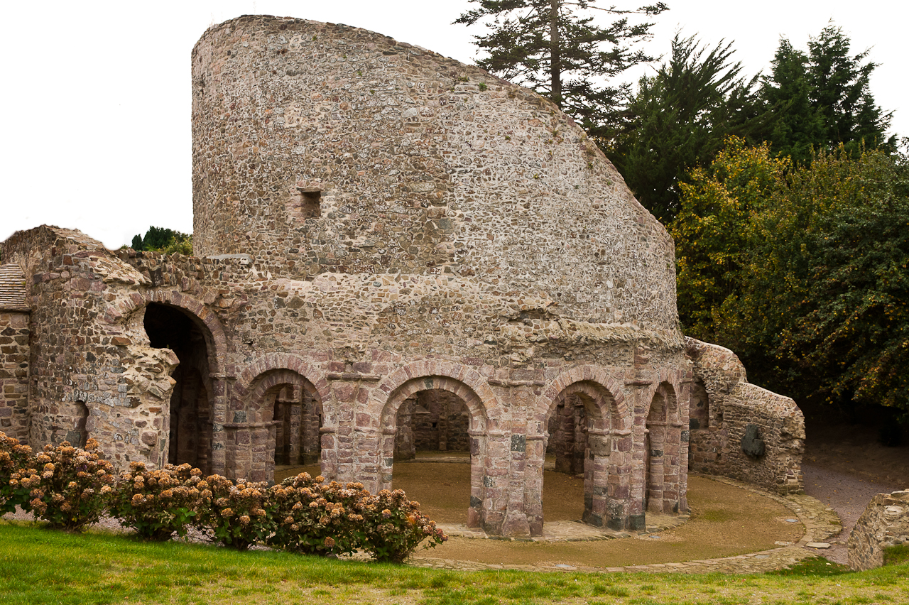 Temple de Lanleff (Bretagne 11ème siècle) vue générale Nord